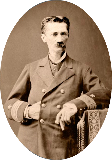 José Galvarino Riveros Cárdenas (Valdivia, Chile, 2 de diciembre de 1829 – † Santiago de Chile, 11 de enero de 1892) fue un marino chileno, comandante de la escuadra chilena durante la Guerra del Pacífico.